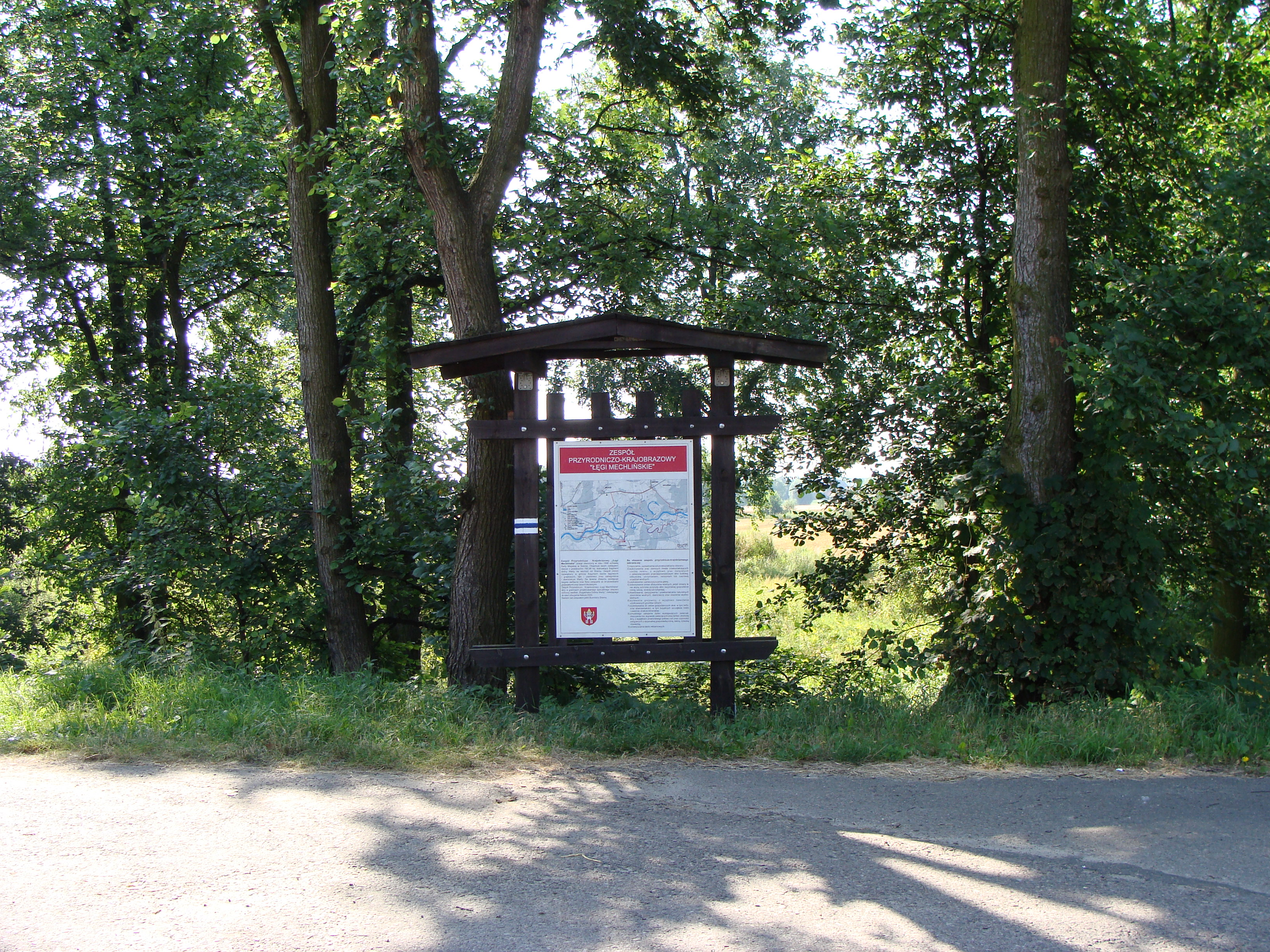 Bystrzek (woj. wielkopolskie, pow. śremski) - Łęgi Mechlińskie.